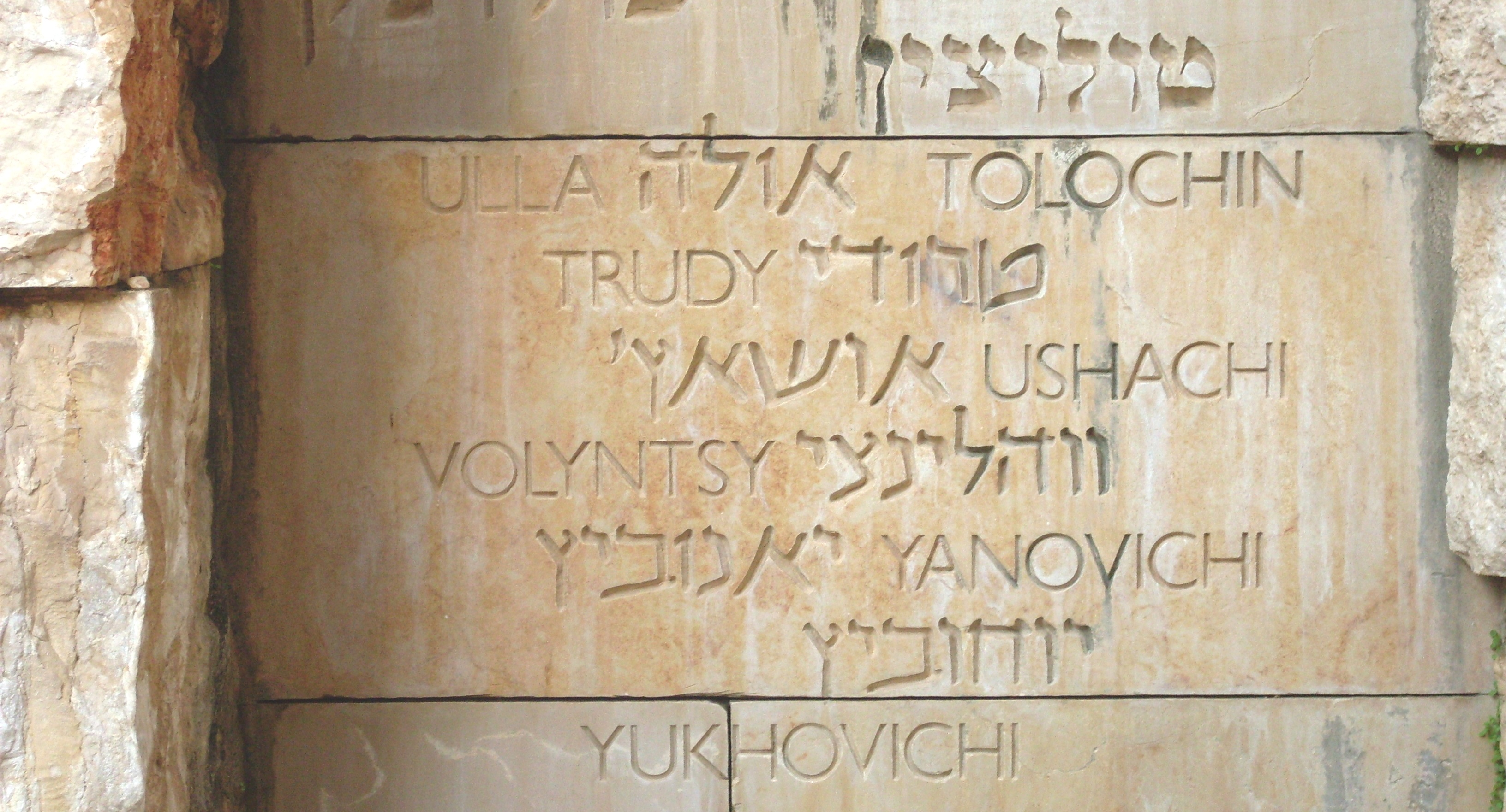 Белорусская часть "Долины разрушенных общин" в Яд Вашем с с названиями еврейских общин на территории послевоенной Беларуси, частично или полностью уничтоженных во время Холокоста.